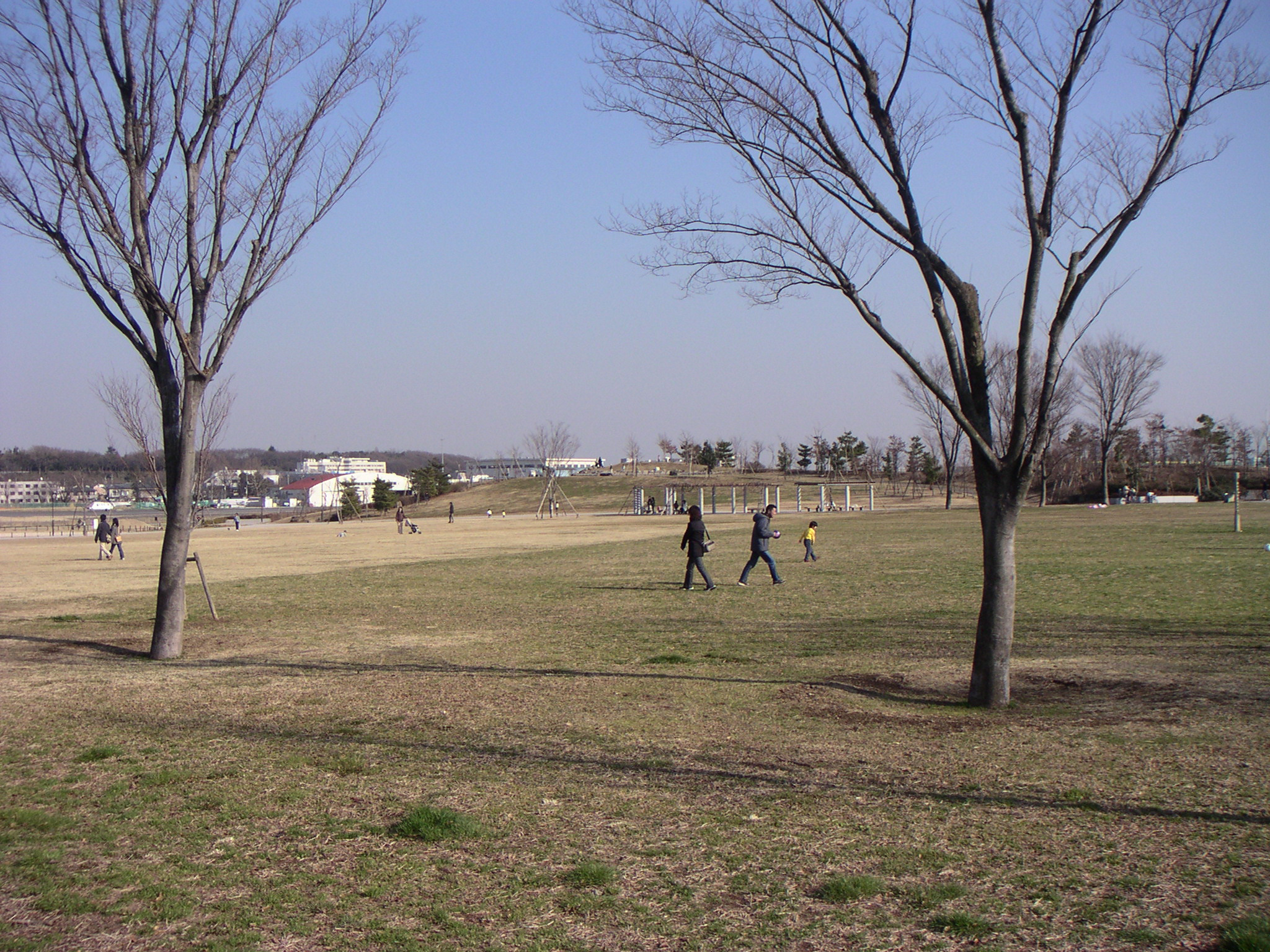 Musashinonomori Park